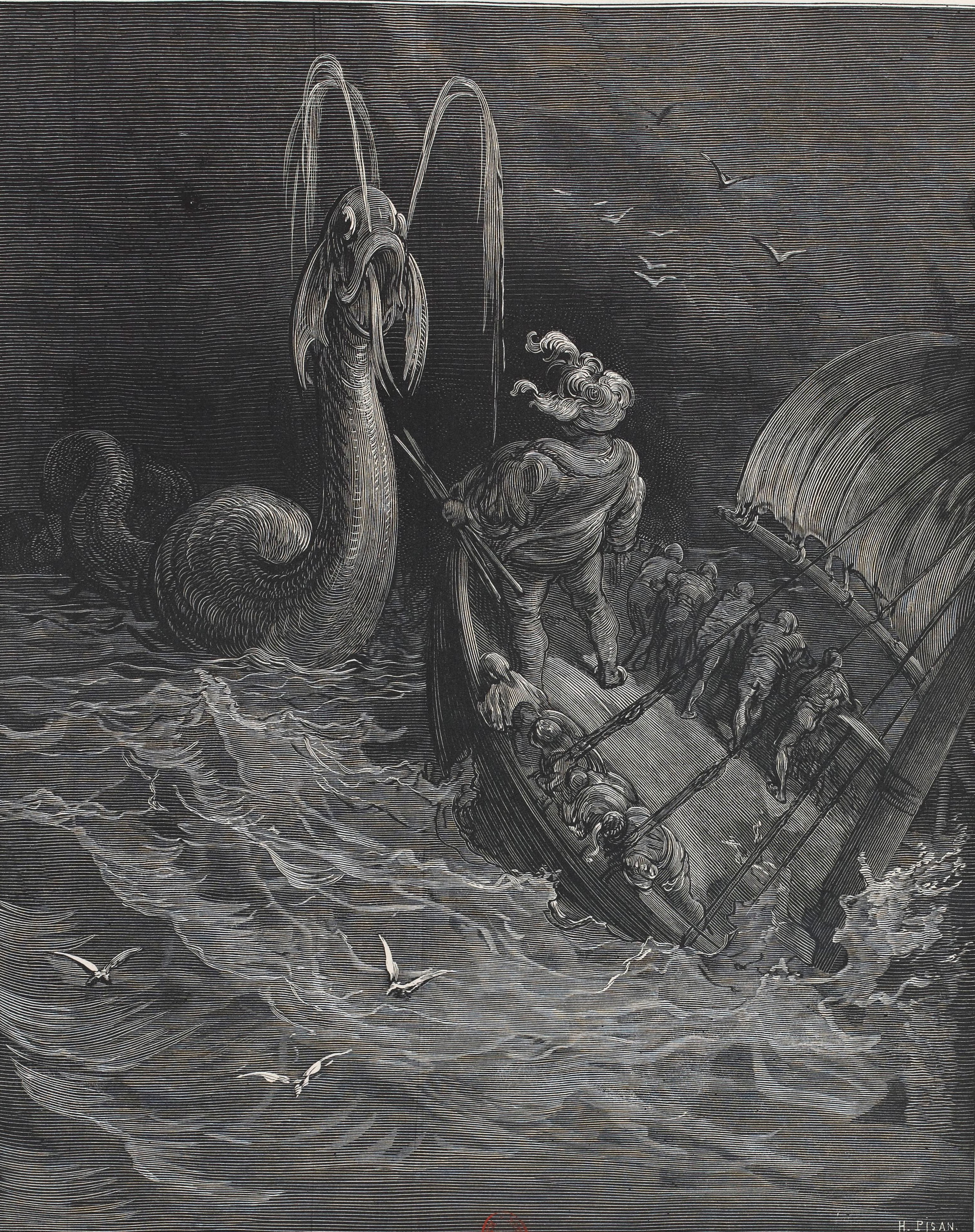 Monstre qui attaque les voyageurs dans le Quart Livre de Rabelais. Illustrations de Gustave Doré en 1873, éditions Garnier Frères